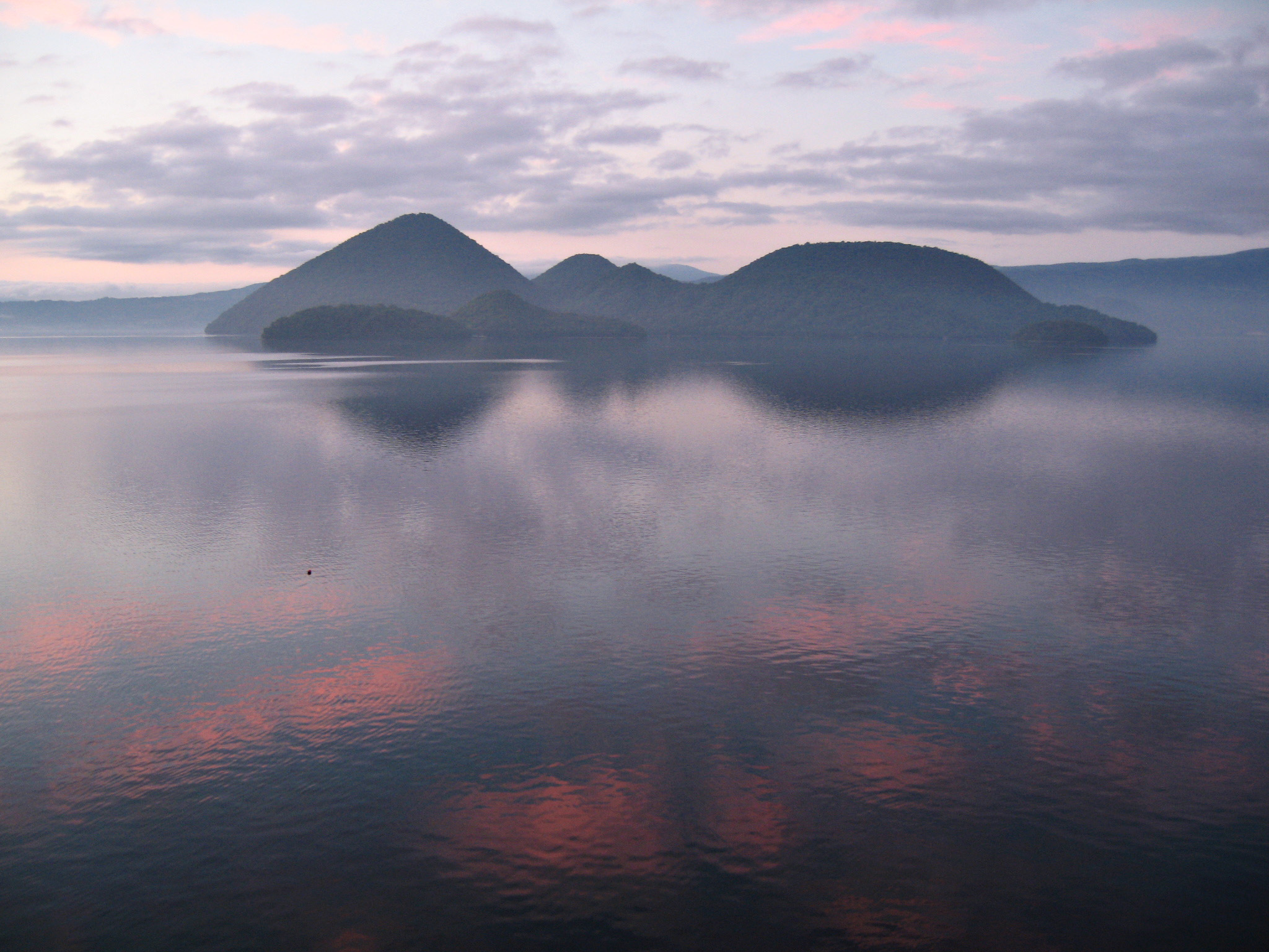 Lac Toya, Hokkaido, Japon